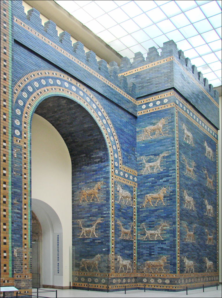 La porte d'Ishtar Cette porte de Babylone, reconstruite en partie dans le musée de Pergame, tient le nom d'Ishtar , une des principales divinités babyloniennes. Elle correspond à la période du règne de Nabuchodonosor II (605-562 av. J.-C.). La porte était totalement revêtue de panneaux en briques émaillées. Visite 2011 article de Wikipedia sur le musée de Pergame